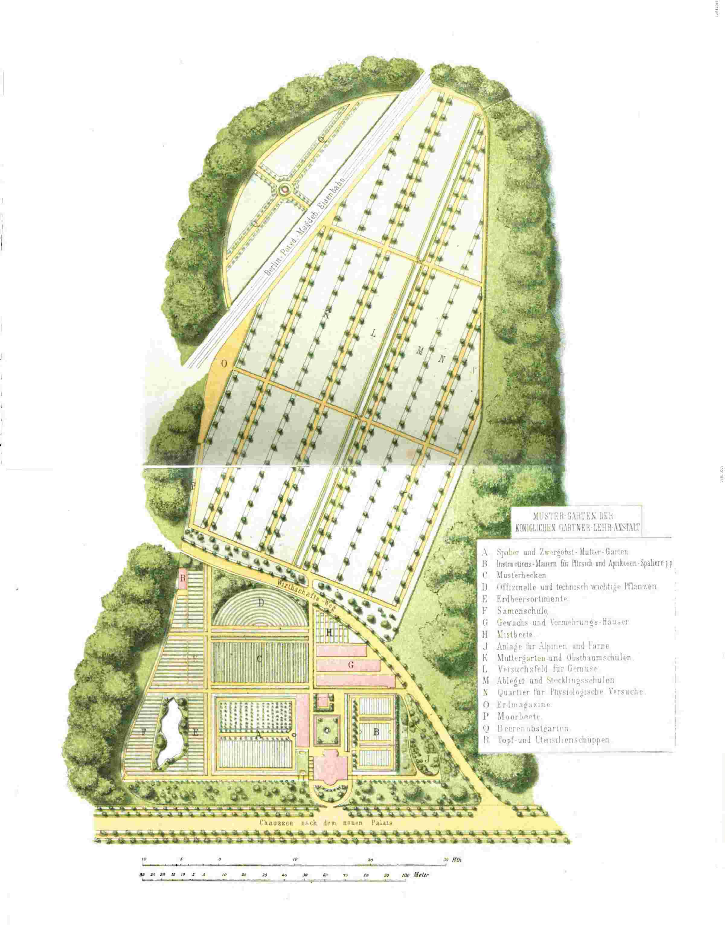 Entwurf des Muster- und Lehrgartens der Königlichen Gärtnerlehranstalt am Potsdamer Neuen Palais von Ferdinand Jühlke